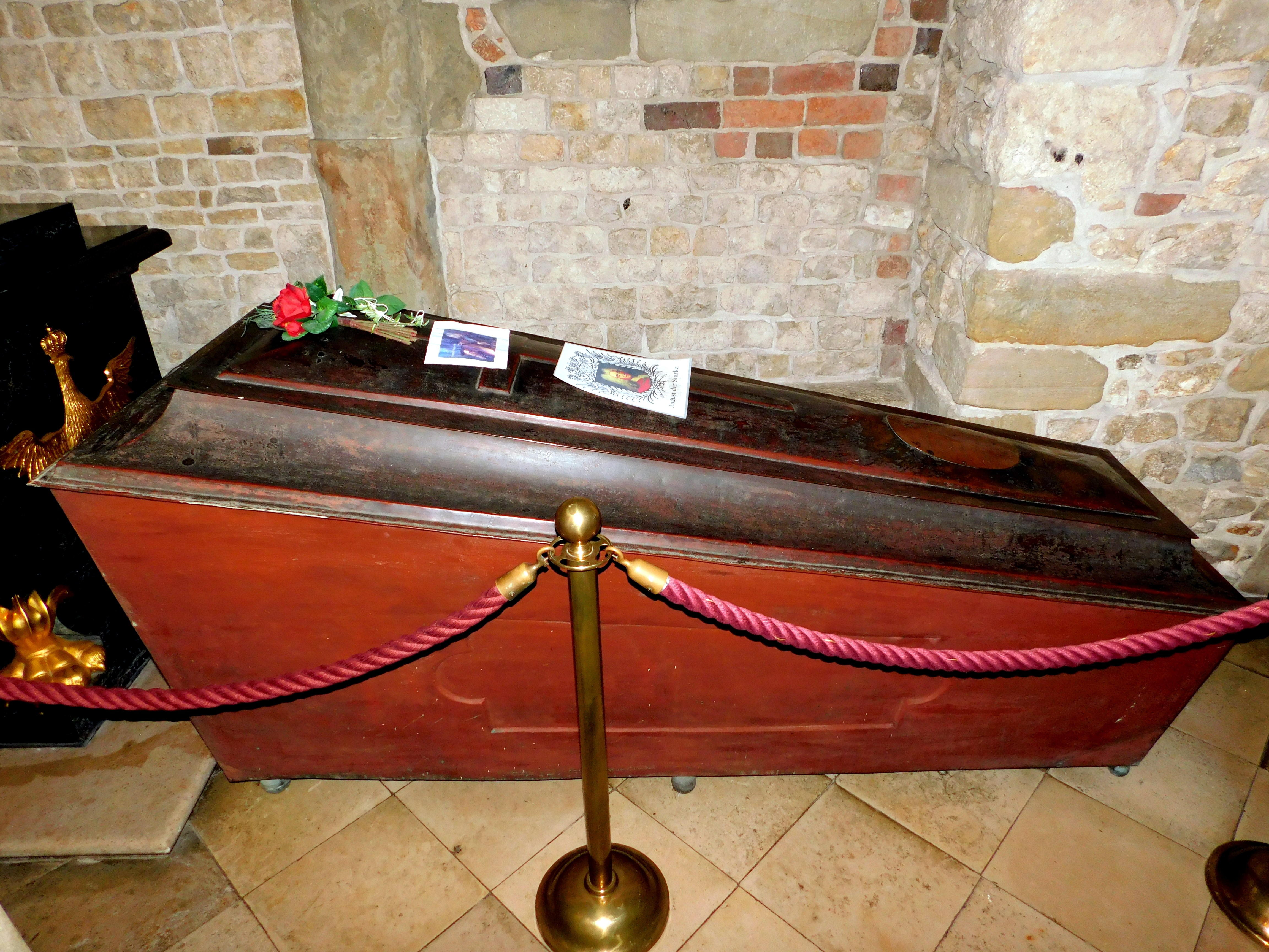 Katedra Wawelska. Sarkofag Augusta II Mocnego - króla polskiego. Tymczasowo ustawiony w krypcie św. Leonarda na czas remontu krypty jagiellońskiej.